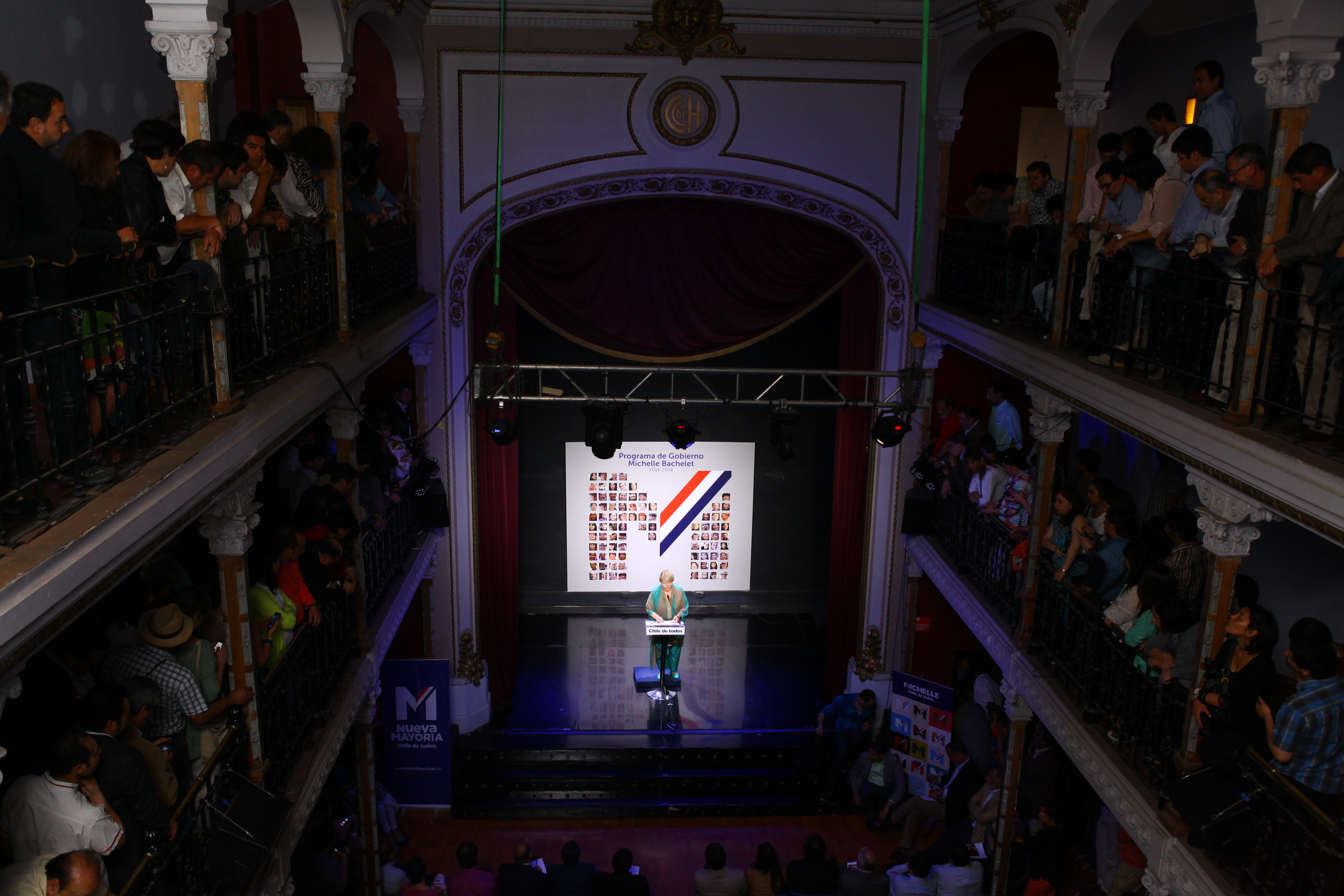 Presentación programa de Gobierno en Teatro Huemul 27/10/2013